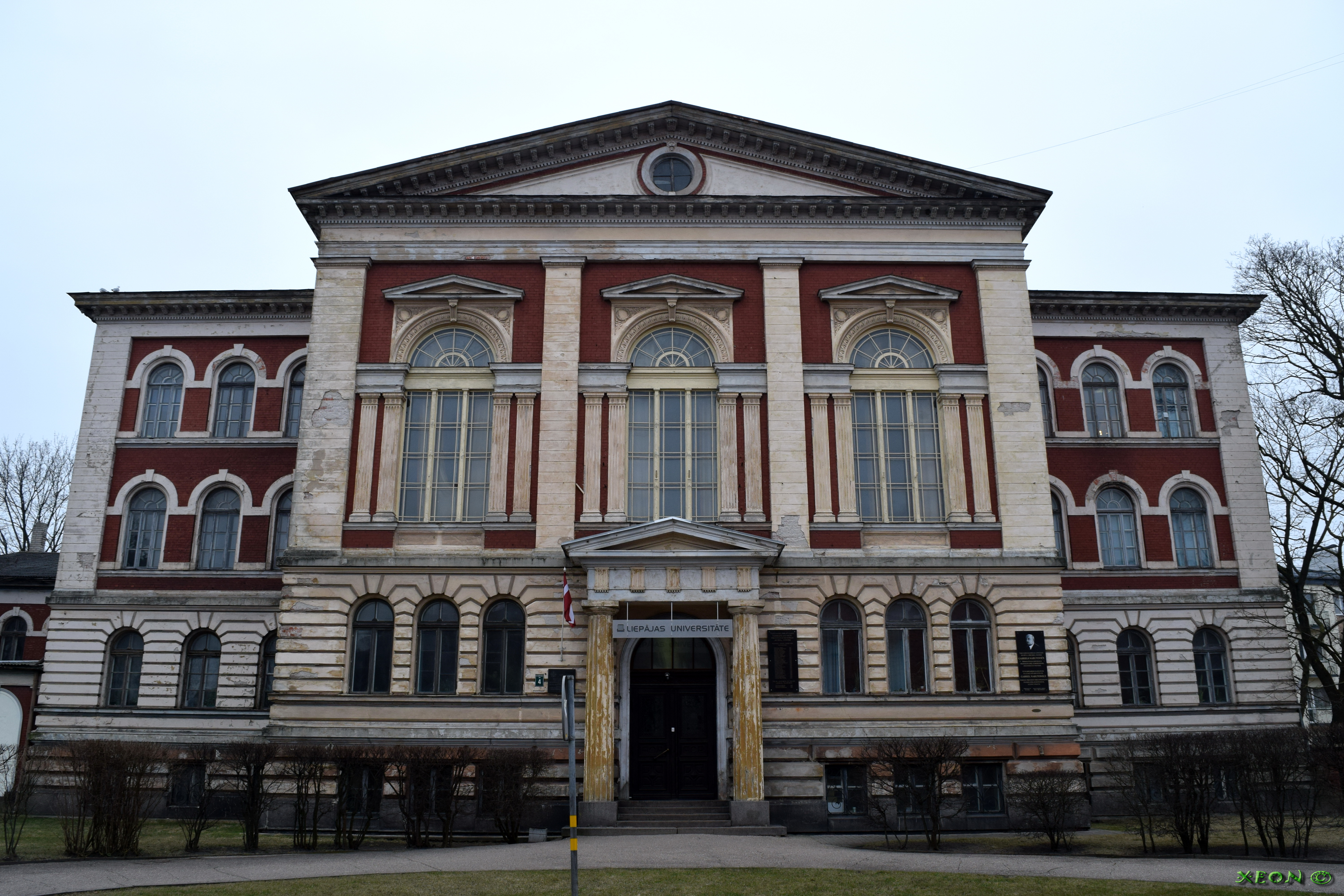 Krisjana Valdemara iela 4 - Bijusi RTU filiāle - Liepajas Universitate